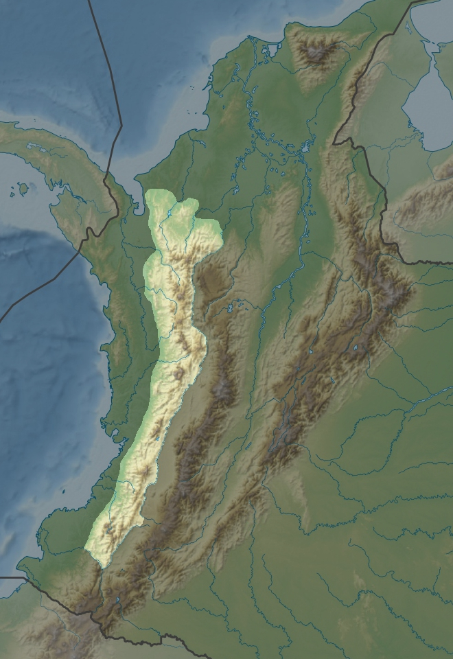 Cordillère Occidentale en Colombie